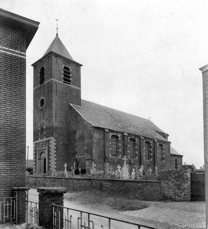 photo ancienne qui représente l'église avec le cimetière